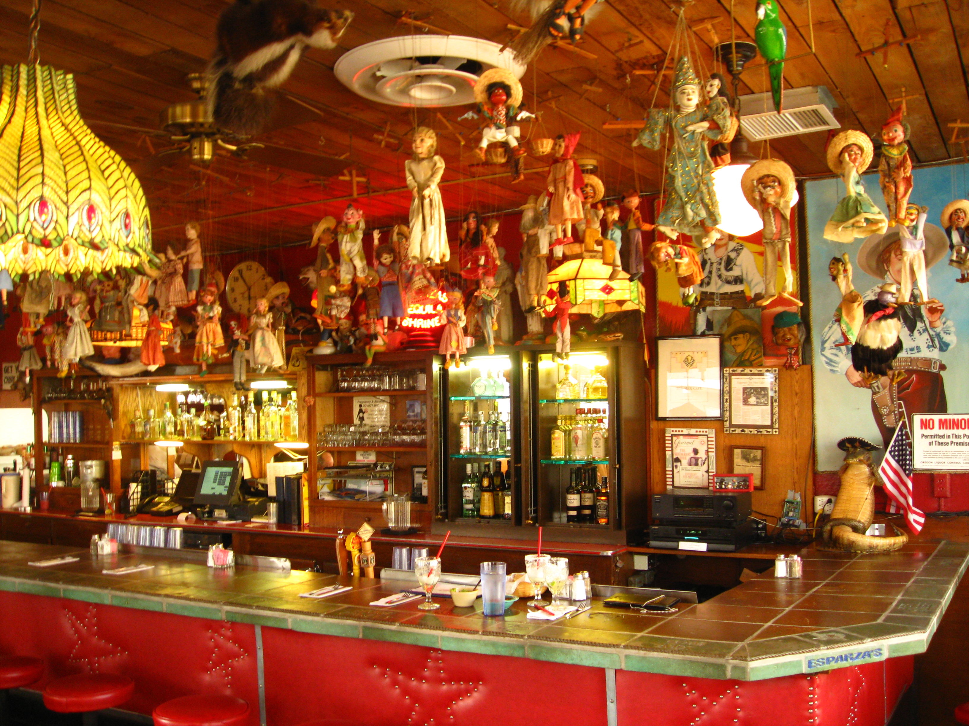 Esparza's in Portland, Oregon in 2008